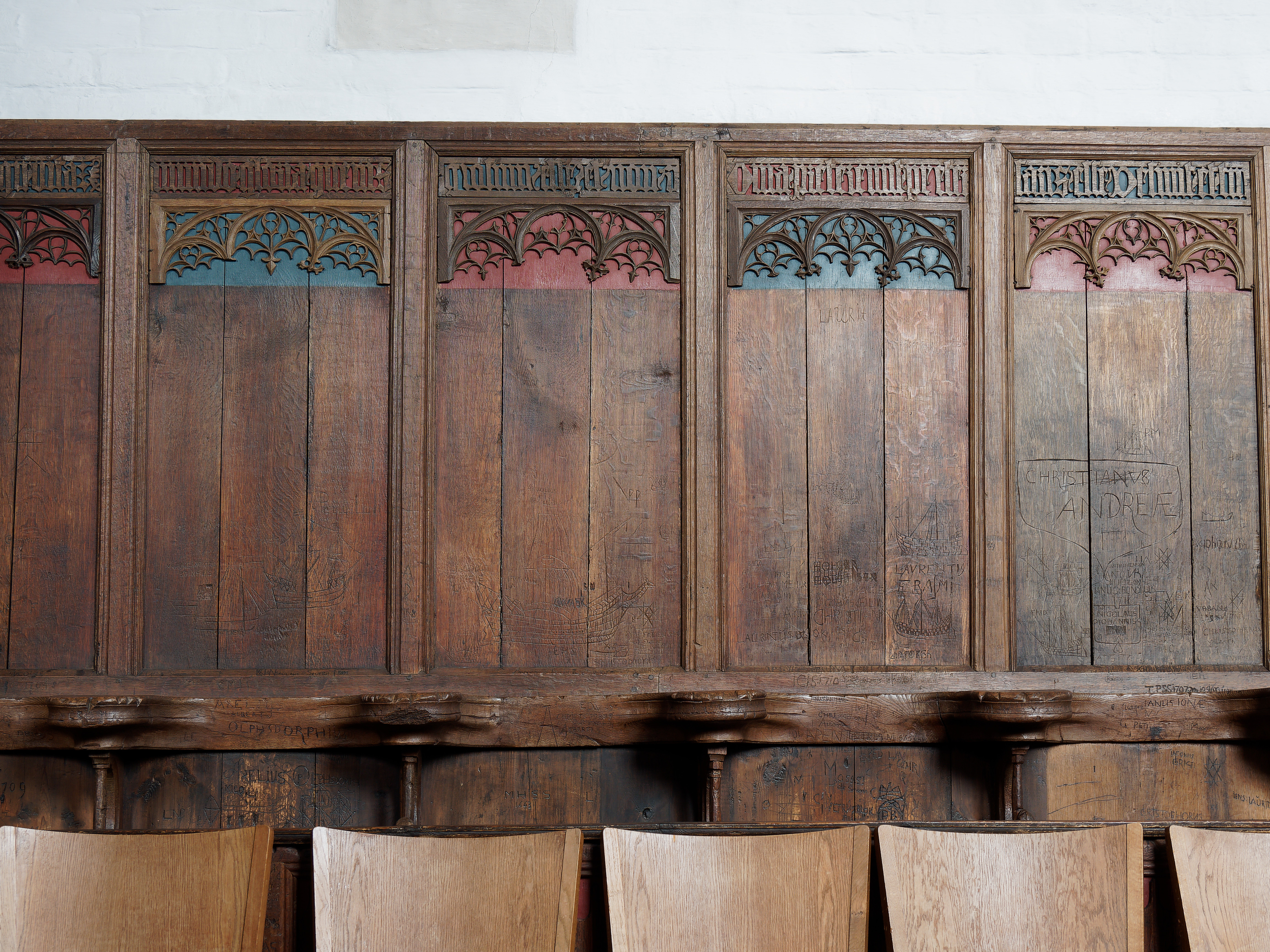 Die Marienkirche in Sæby (Frederikshavn Kommune), errichtet im 13 Jahrhundert, Chorgestühl mit Gravuren im Holz.